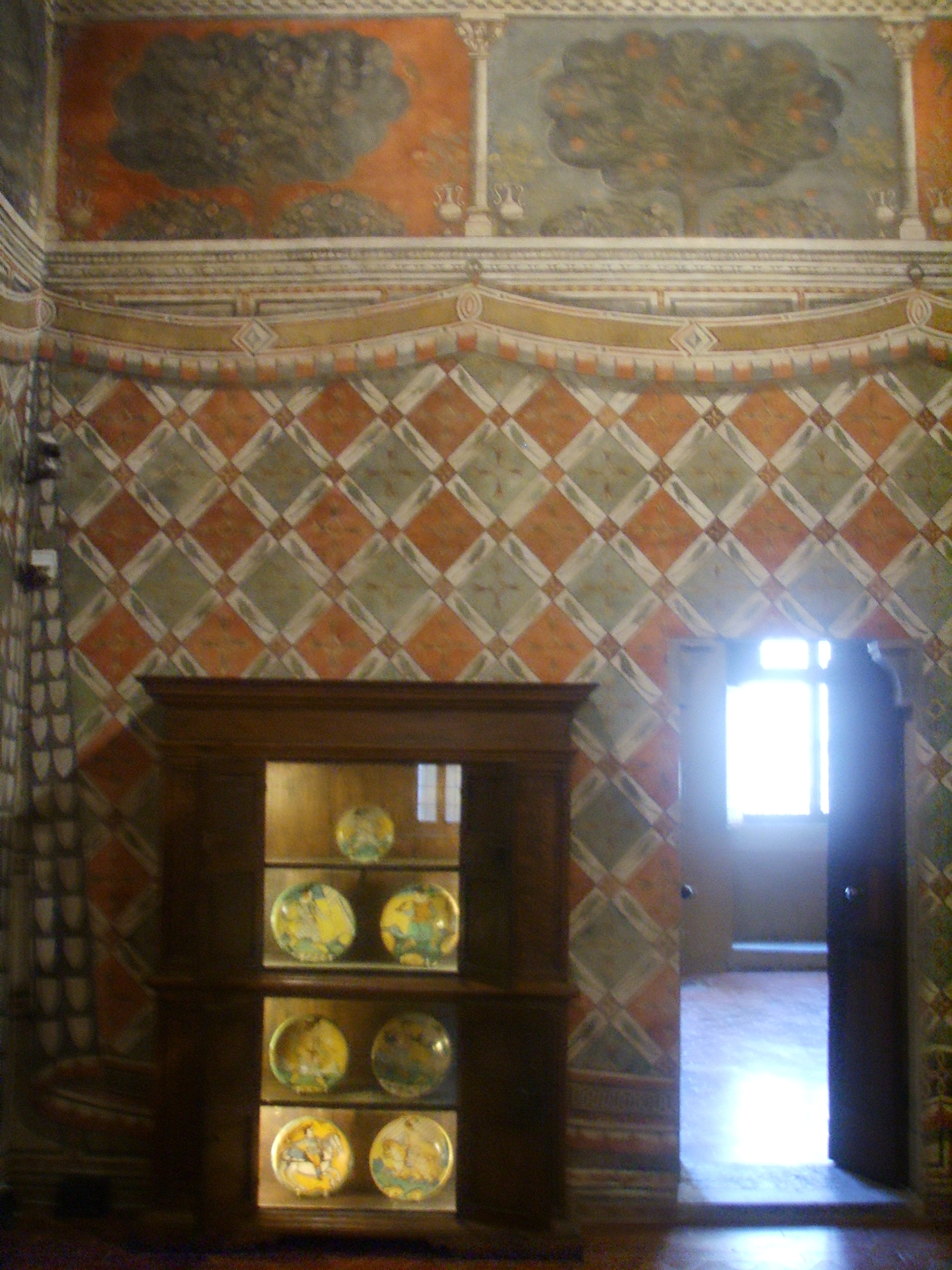 Davanzati Palace, Museum of antique florentine house (Museo della Casa fiorentina antica) Sala dei Pappagalli (parrots hall) in Florence, Italy